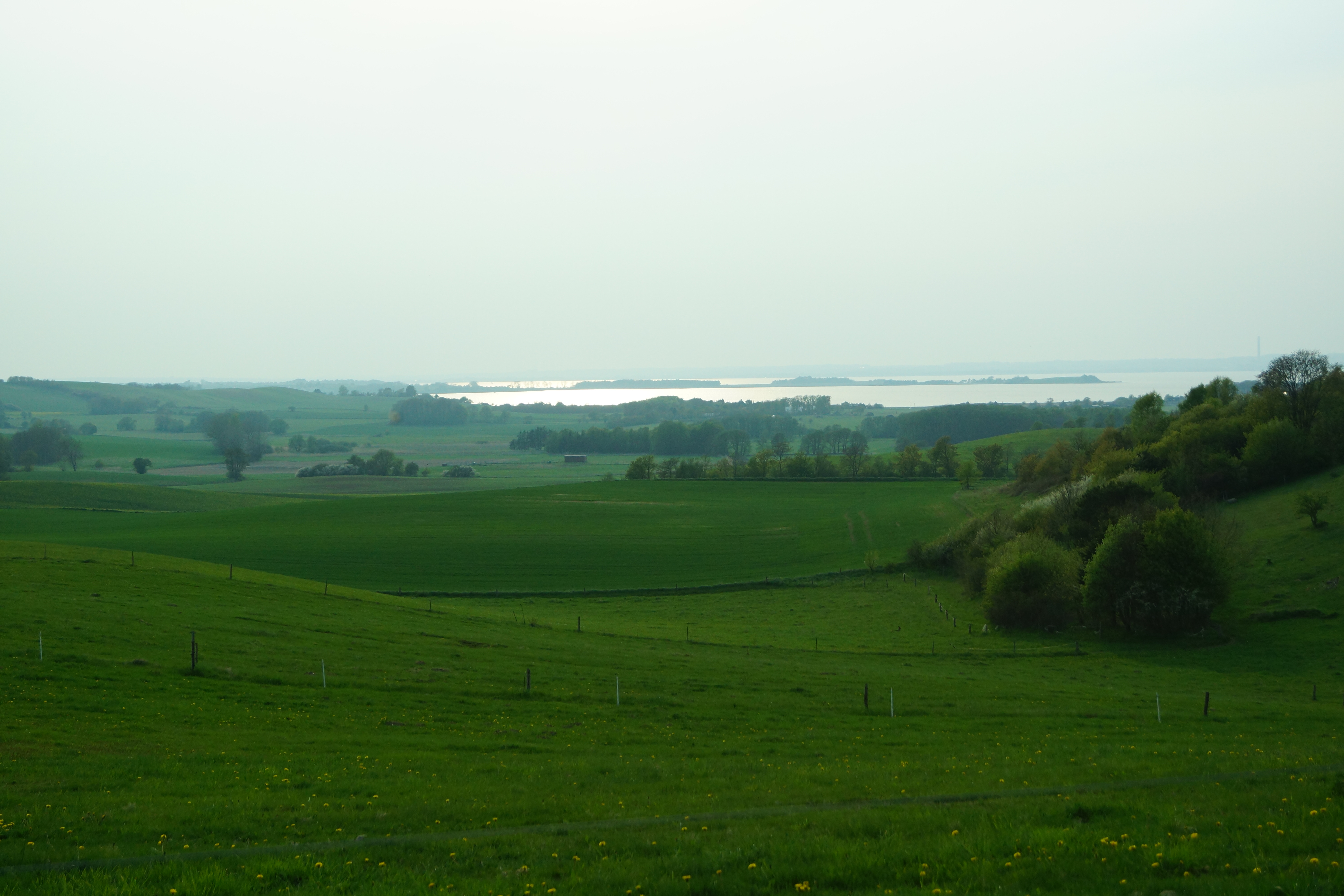 Mols Bjerge udsigt mod Begtrup Vig